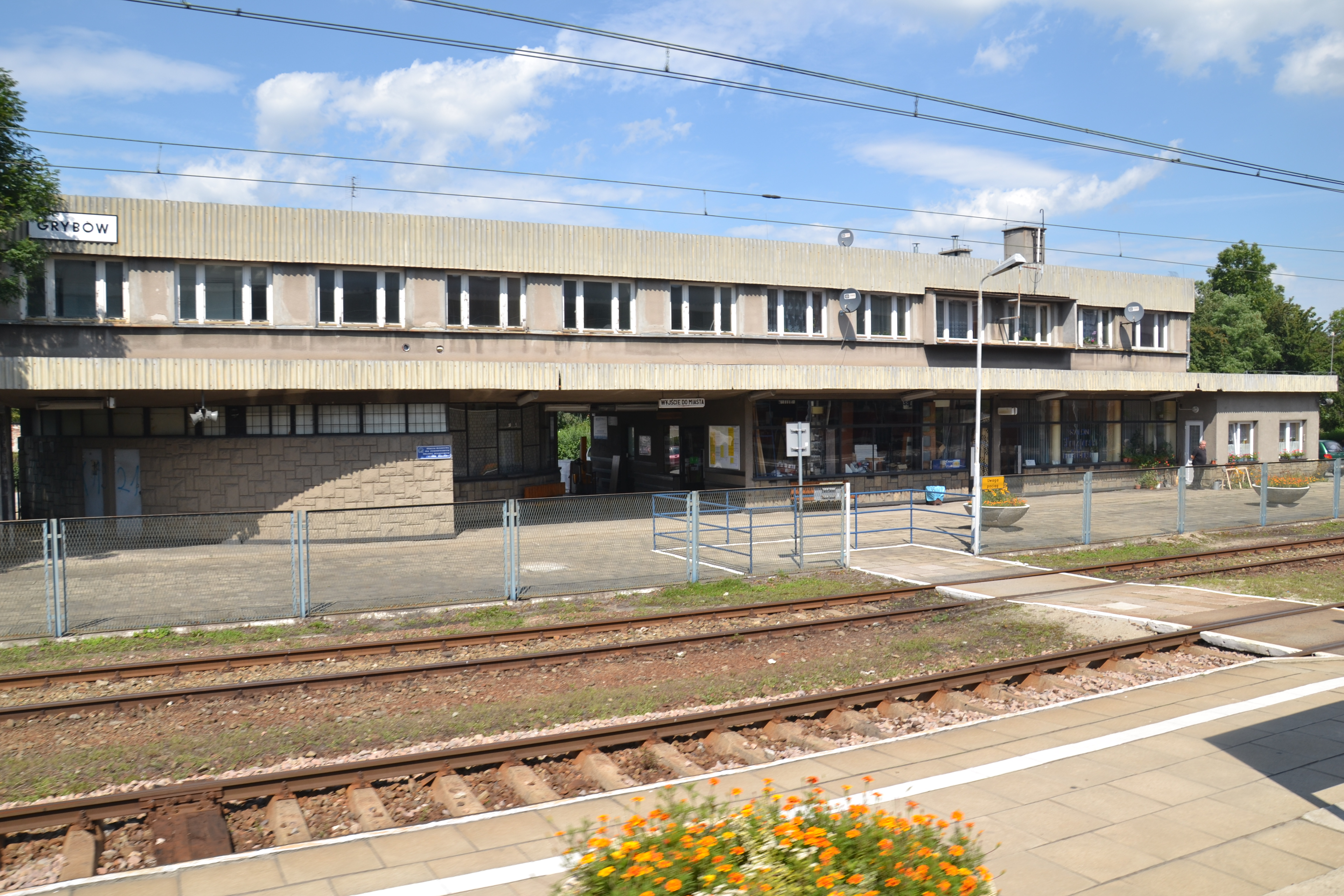 Budynek stacji w Grybowie